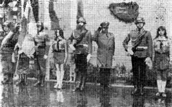 Poznań, święto MO i SB 10-10-1974, SP nr 10 - nadanie imienia Milicji Obywatelskiej i SB oraz sztandaru